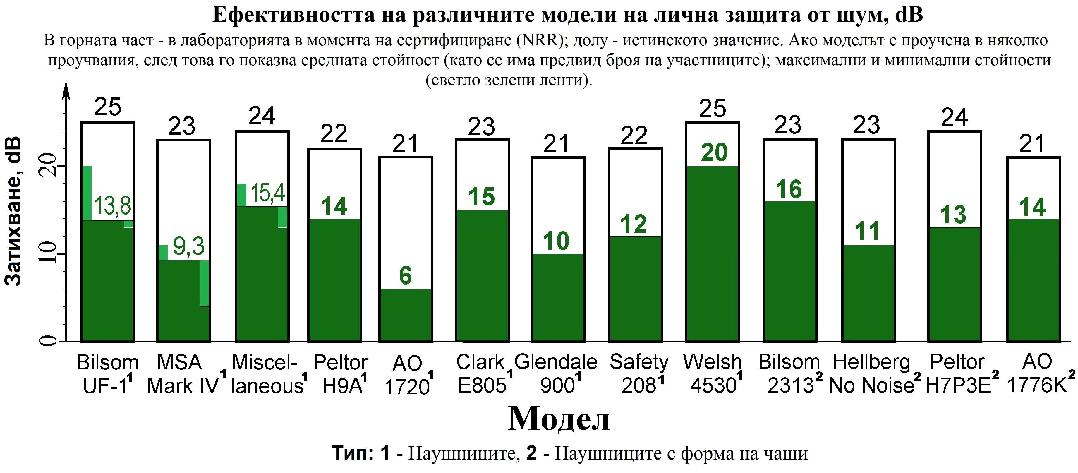 Иллюстрация к документу NIOSH, показывающая несоответствие лабораторной (сертификационной) эффективности средств индивидуальной защиты органа слуха (СИЗОС) и реальной (для наушников). Диаграмма построена на основании информации из таблицы 6-1 из Occupational Noise Exposure. Revised Criteria 1998